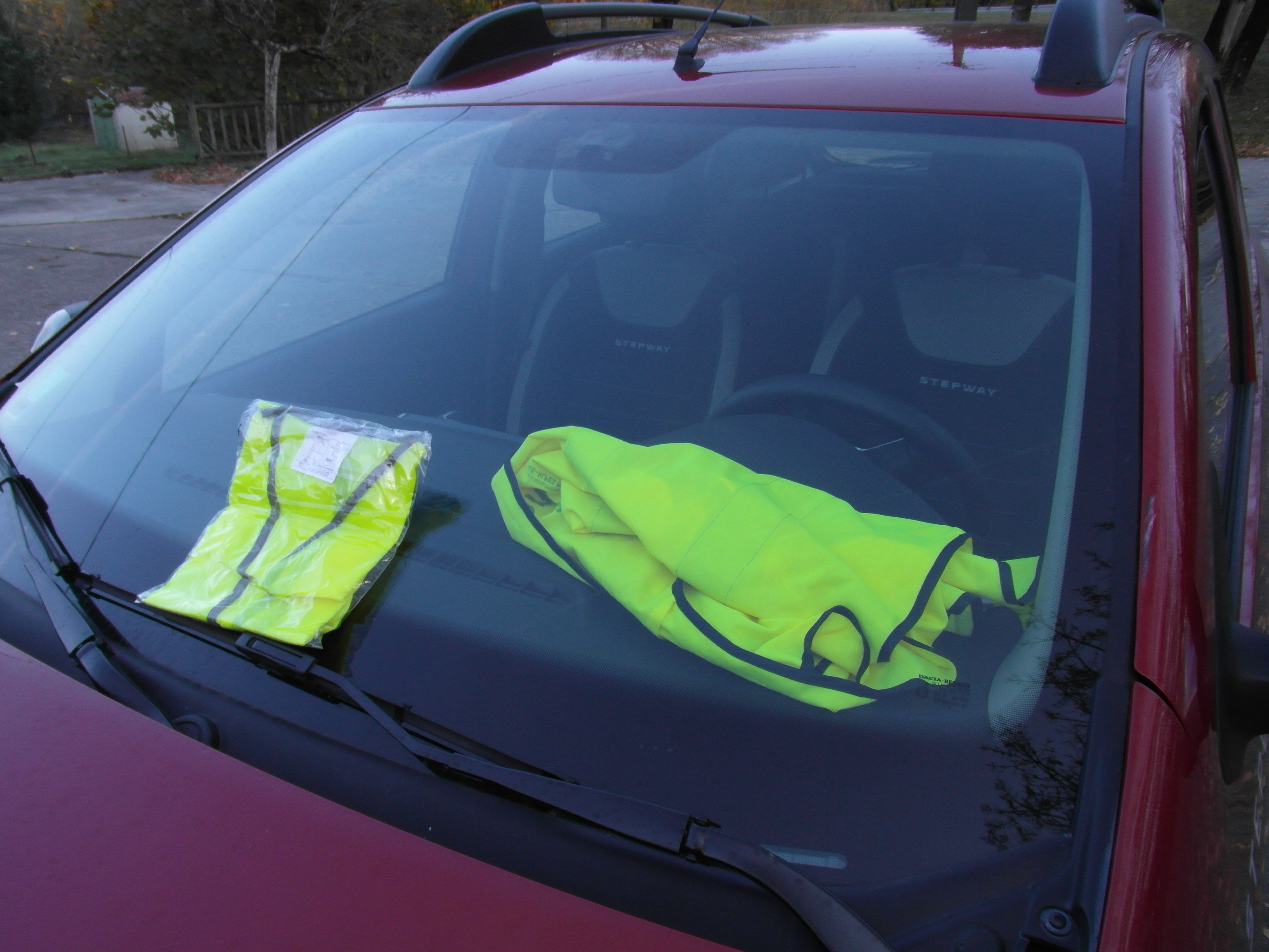 Gilets jaunes sur le pare-brise d'une voiture